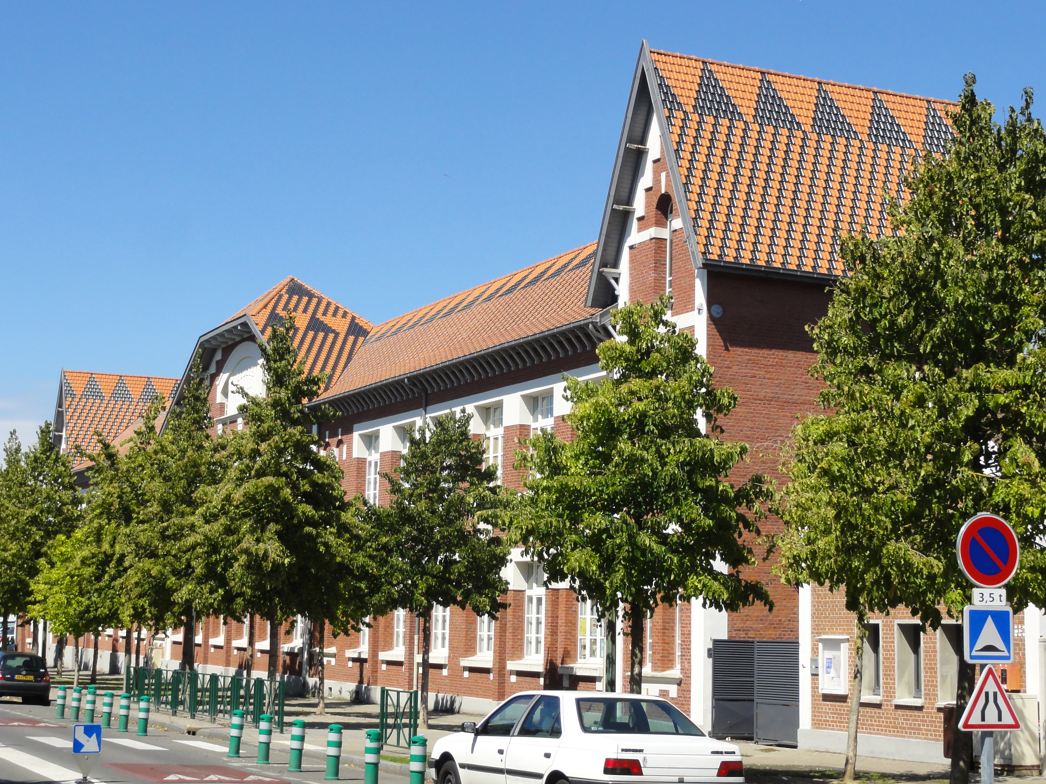 Écoles des cités de la fosse n° 4 - 4 bis - 4 ter de la Compagnie des mines de Bruay, Bruay-la-Buissière, Pas-de-Calais, Nord-Pas-de-Calais, France.